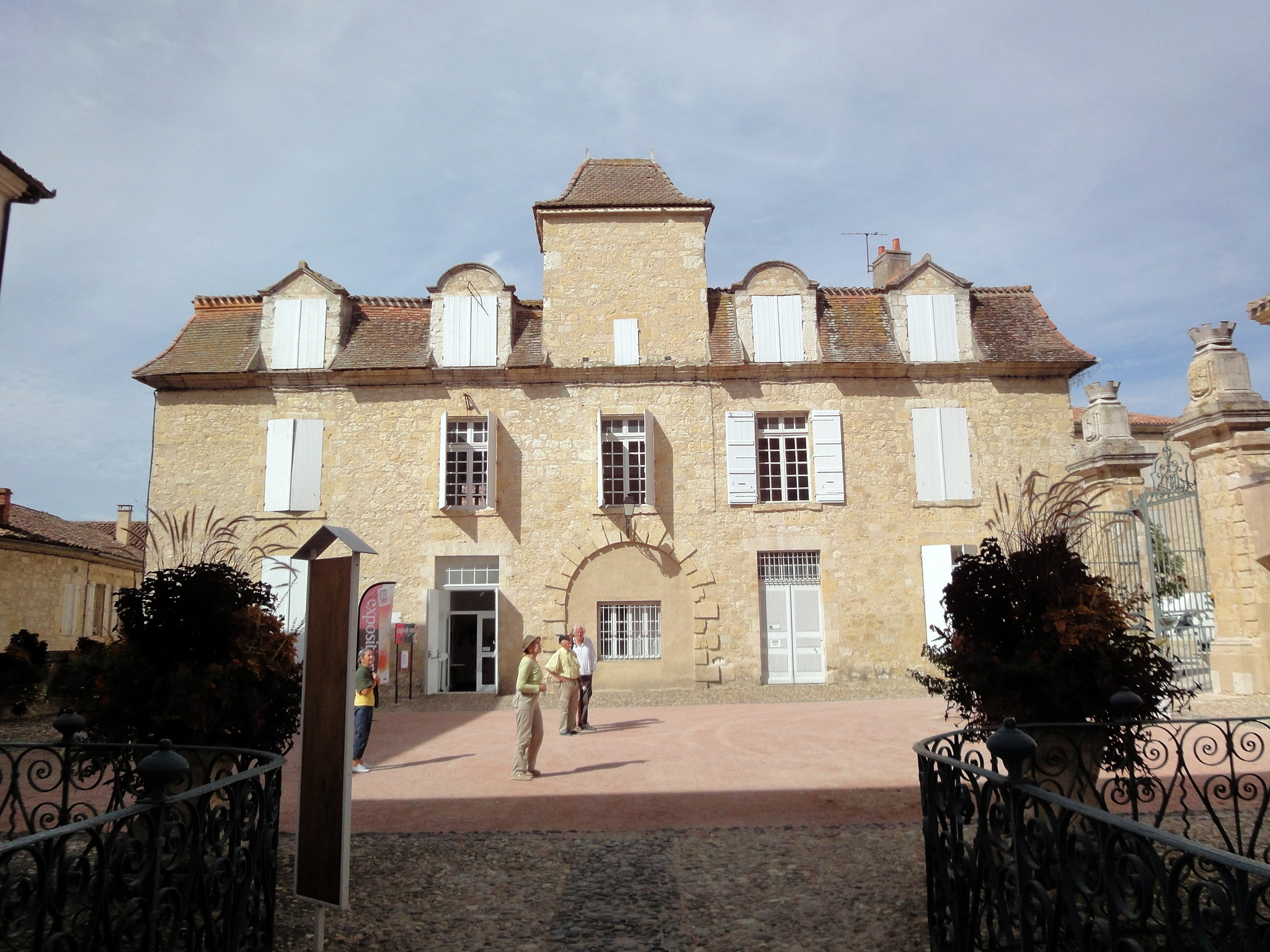 Lectoure (Gers, Midi-Pyrénées, France) : Anciennes écuries de l'évêché, relais de poste, puis bâtiment des PTT, aujourd’hui office de tourisme, salle d'expositions et archives municipales, cour de l’hôtel de ville (vue prise de l’entrée de l’hôtel de ville).